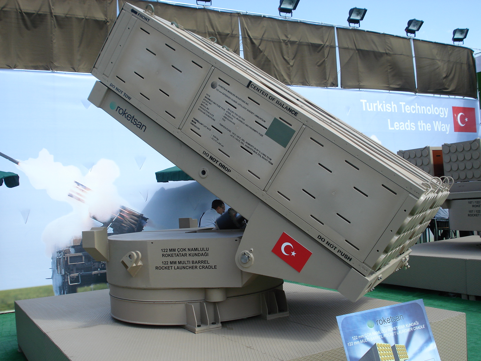 IDEF '07 Savunma Fuarı'nda çekildi. Roketsan. 23 Mayıs 2007